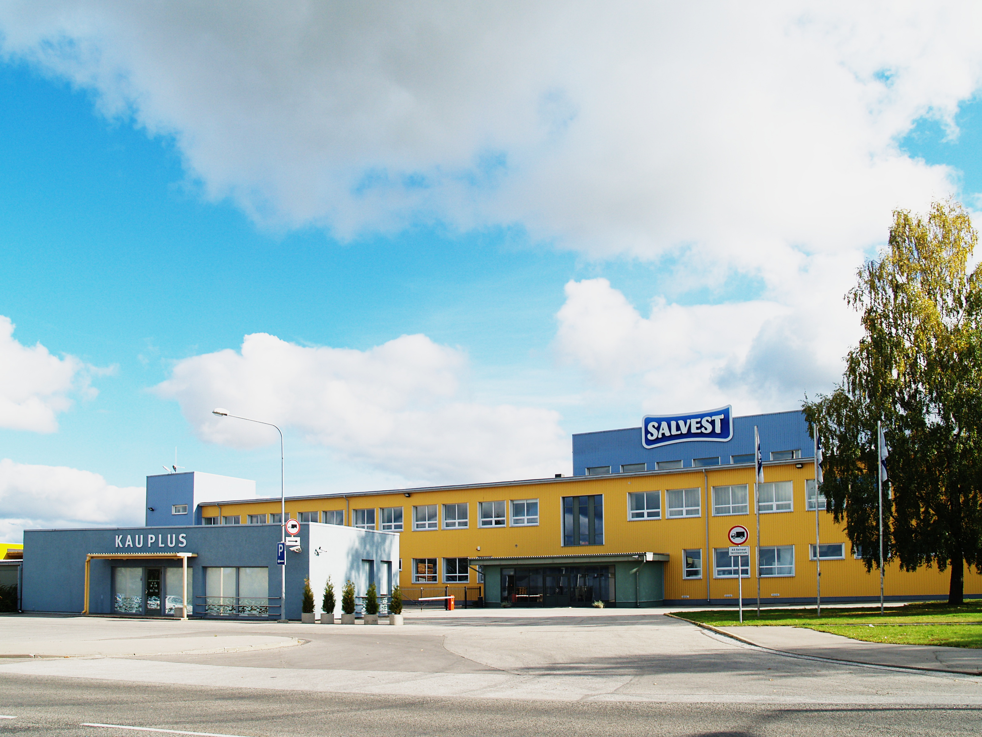 AS Salvest tootmishoone Tartus.